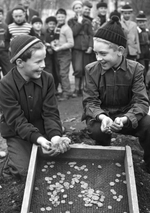 Solbergaskatten: I maj 1955 gick pojkdrömmen i uppfyllelse för två pojkar, som båda hette Tomas. De hittade en skatt bestående av 2132 silvermynt samt några smycken.